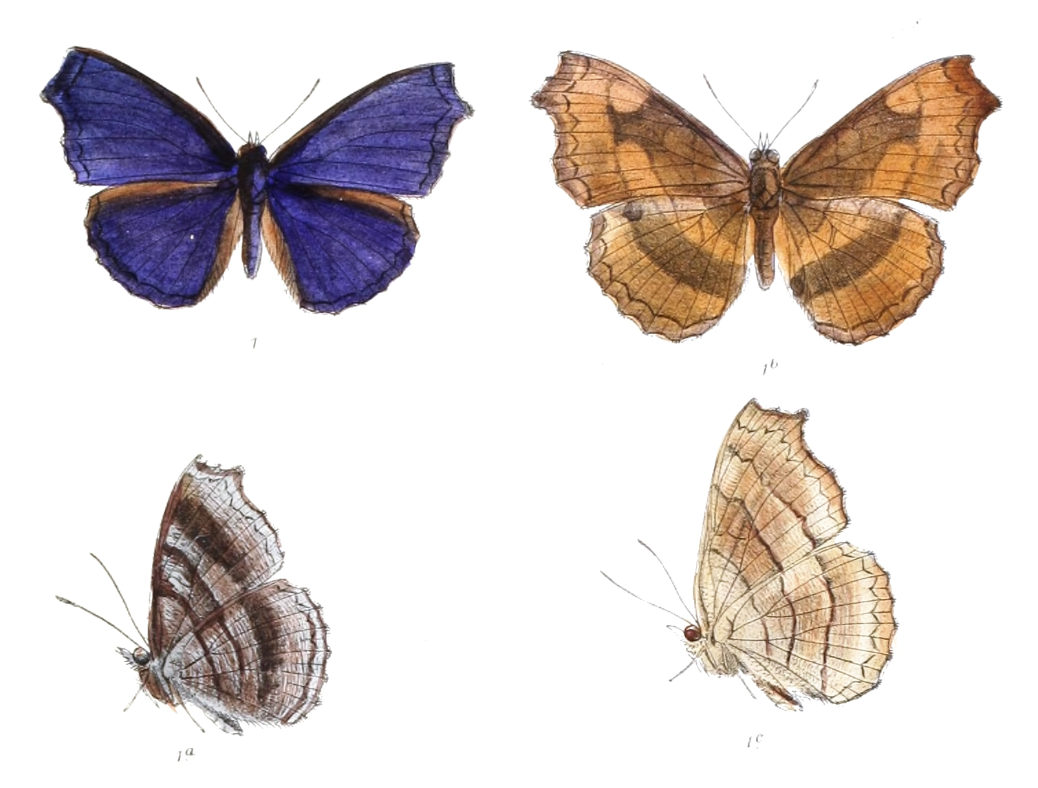 Laringa castelanui